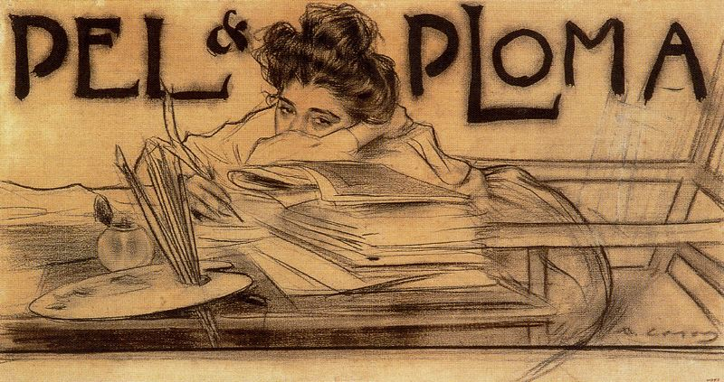 6: Portada de Pel & Ploma, de Ramon Casas i Carbó